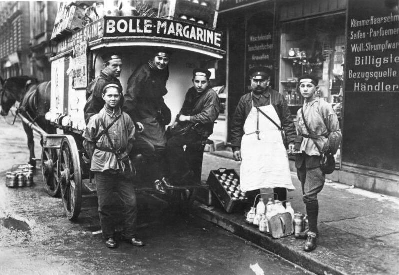 Berlin, Bolle- Milchwagen ADN-Zentralbild/Archiv Berlin 1927 Milchwagen der Meierei Bolle bei der morgendlichen Lieferfahrt durch Berlin. UBz: den Fahrer und Verantwortlichen mit seinen "Bollejungen" am Milchwagen. 32277-27 [Scherl Bilderdienst]